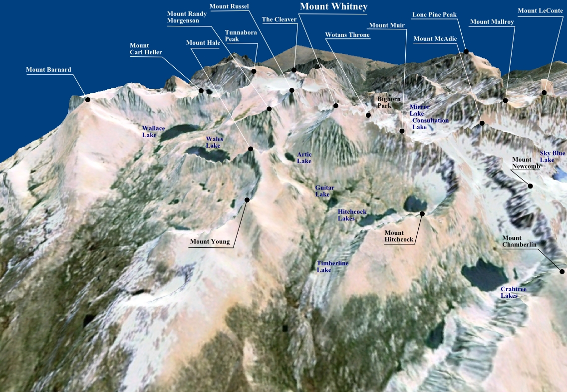 Harta 3D a Muntelui Whitney realizata cu date SRTM furnizate liber de NASA.